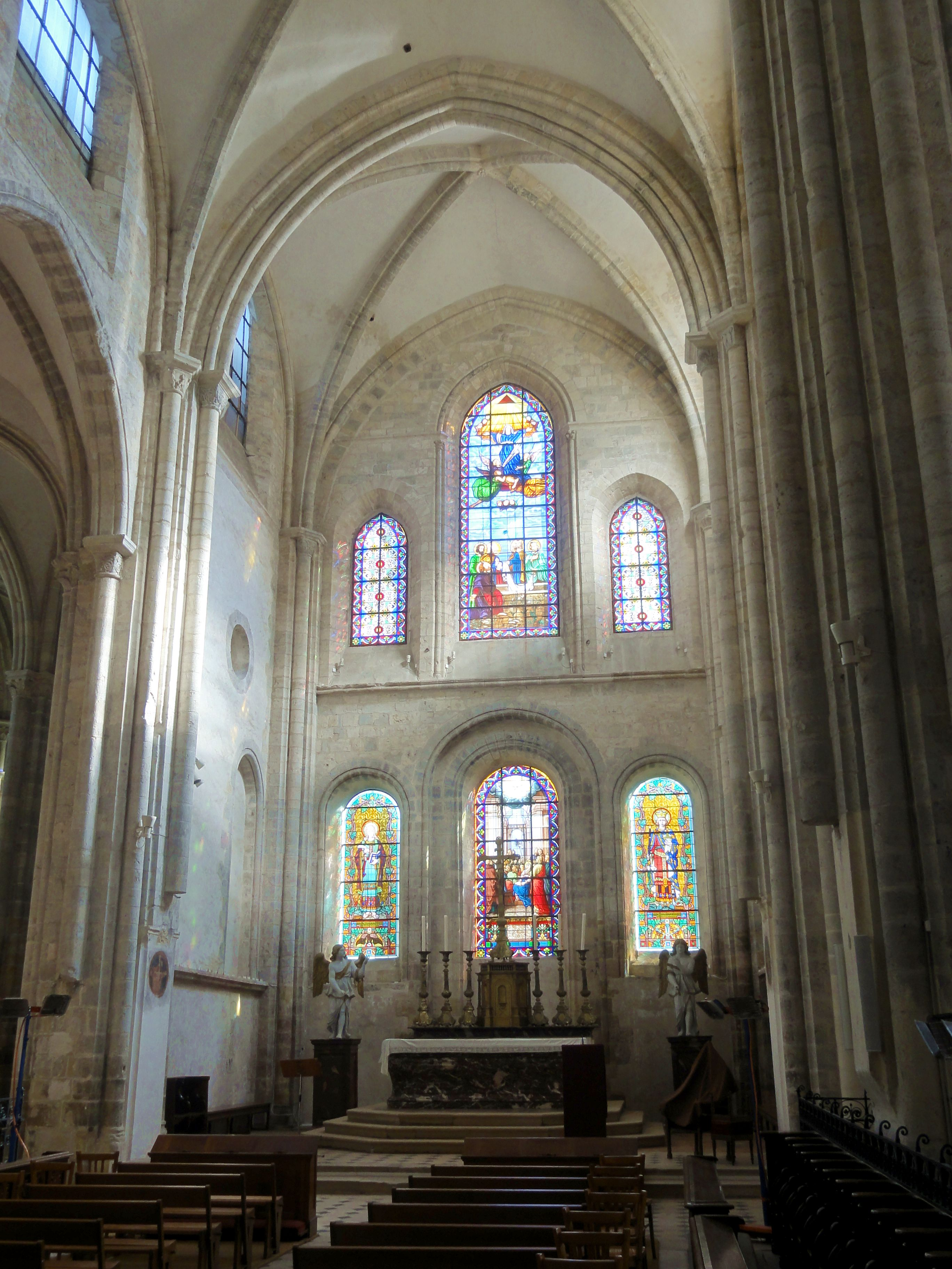 Chœur, 2e travée, vue vers l'est.